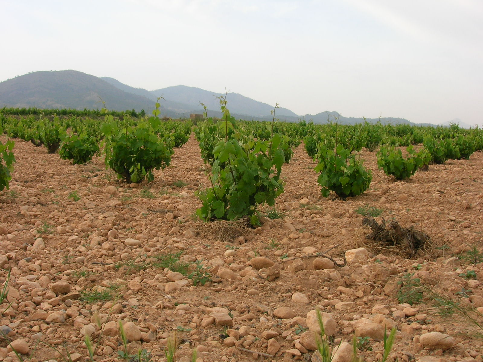 Viña de Vino en el Vinalopó